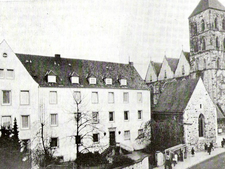 Kinderheim St. Johann für kleine Kinder und Säuglinge